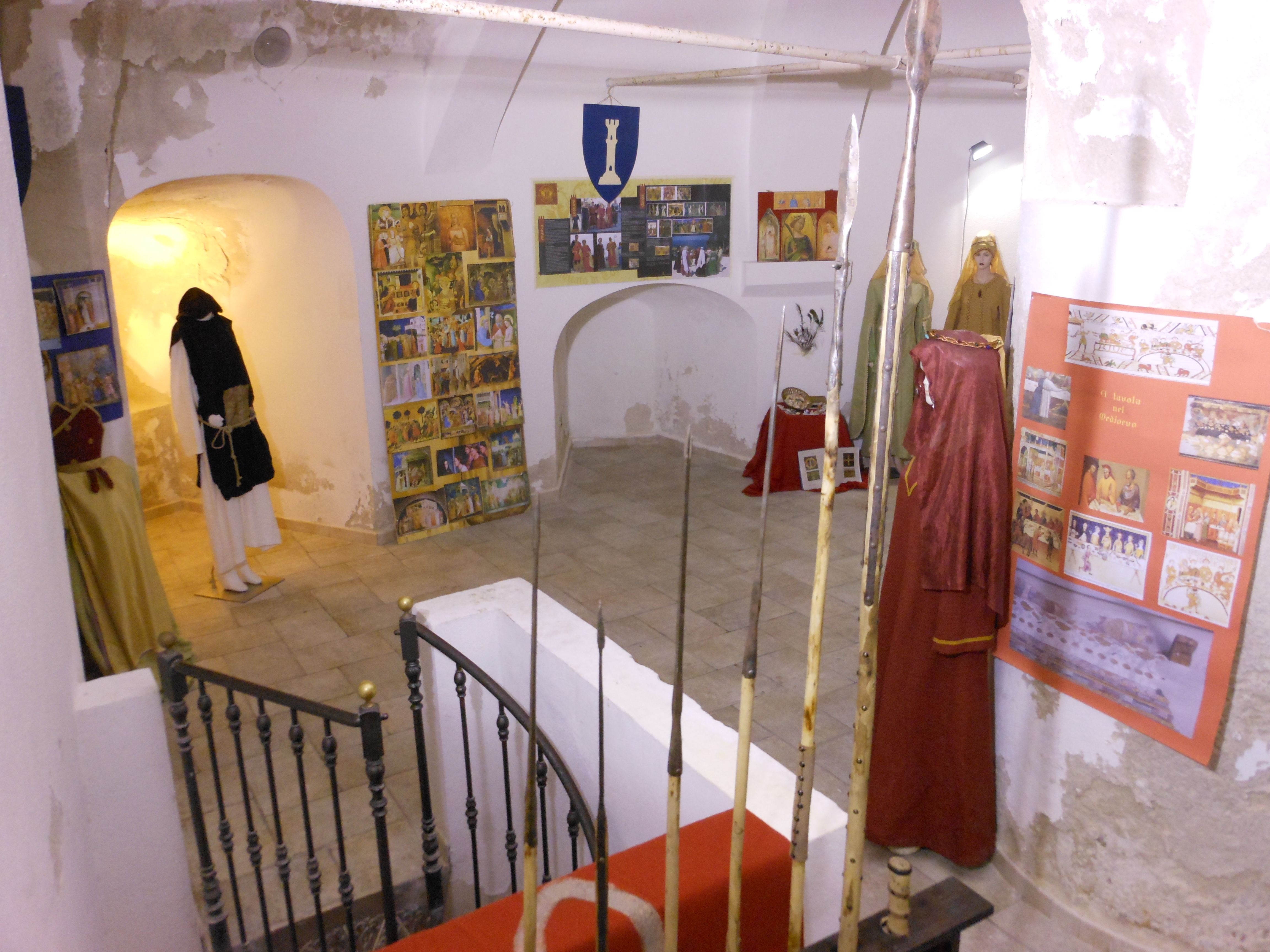 Porto Torres - Torre del Porto